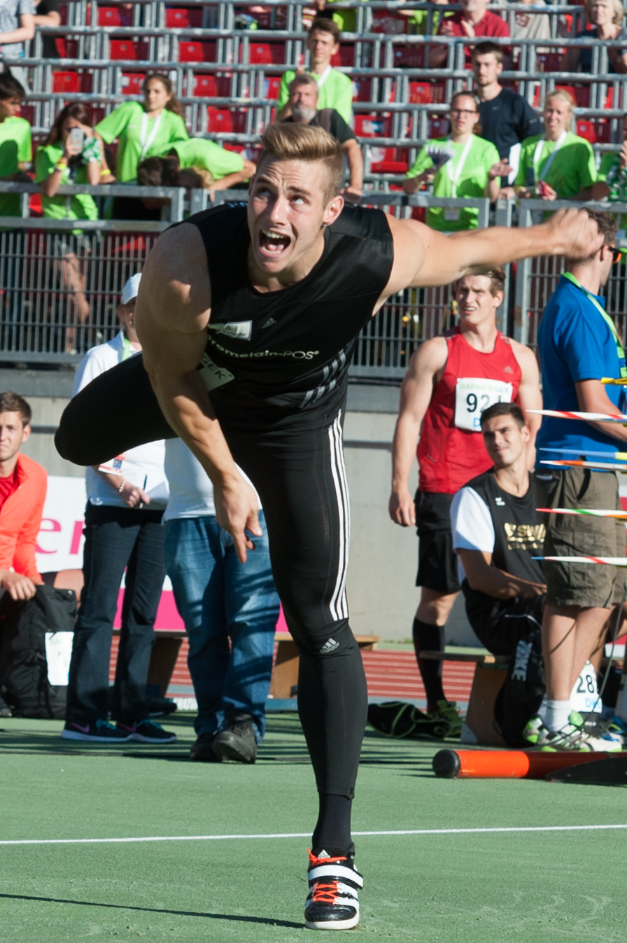 Deutsche Leichtathletik-Meisterschaften 2015: Männer Speerwurf - Johannes Vetter, SV Saar 05 Saarbrücken